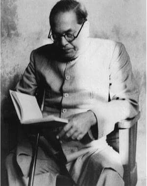 पुस्तक वाचतांना बाबासाहेब